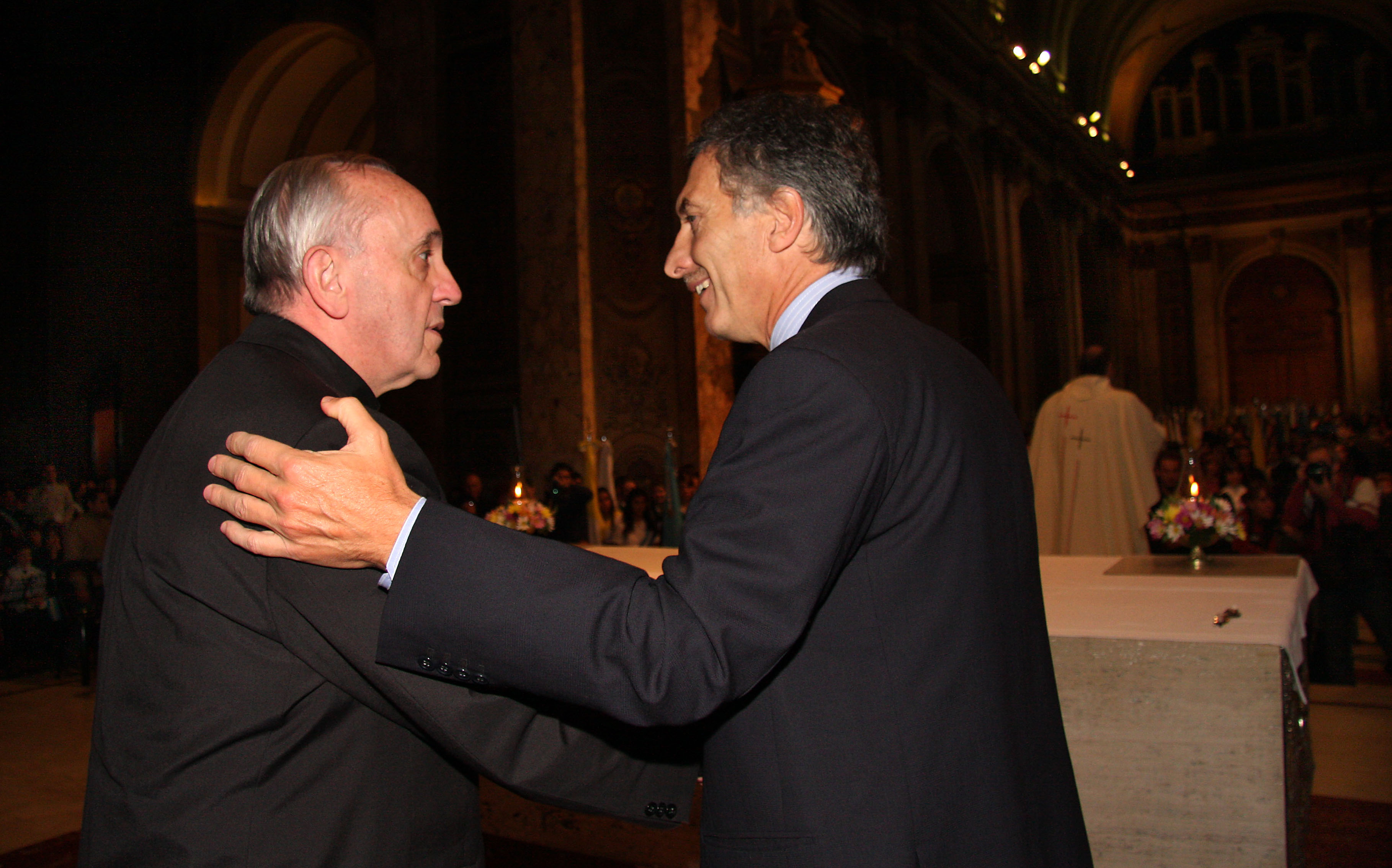 El Jefe de Gobierno porteño, Mauricio Macri, asistió a la Misa por la Educación, oficiada por el Arzobispo de Buenos Aires, Cardenal Jorge Bergoglio, en la Catedral Metropolitana. Foto: Sandra Hernández-gv/GCBA